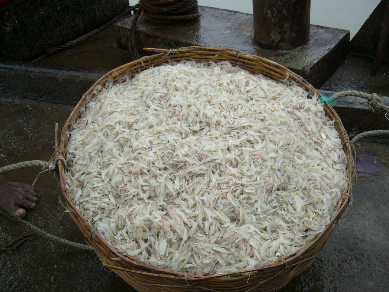 Shrimp bangladesh